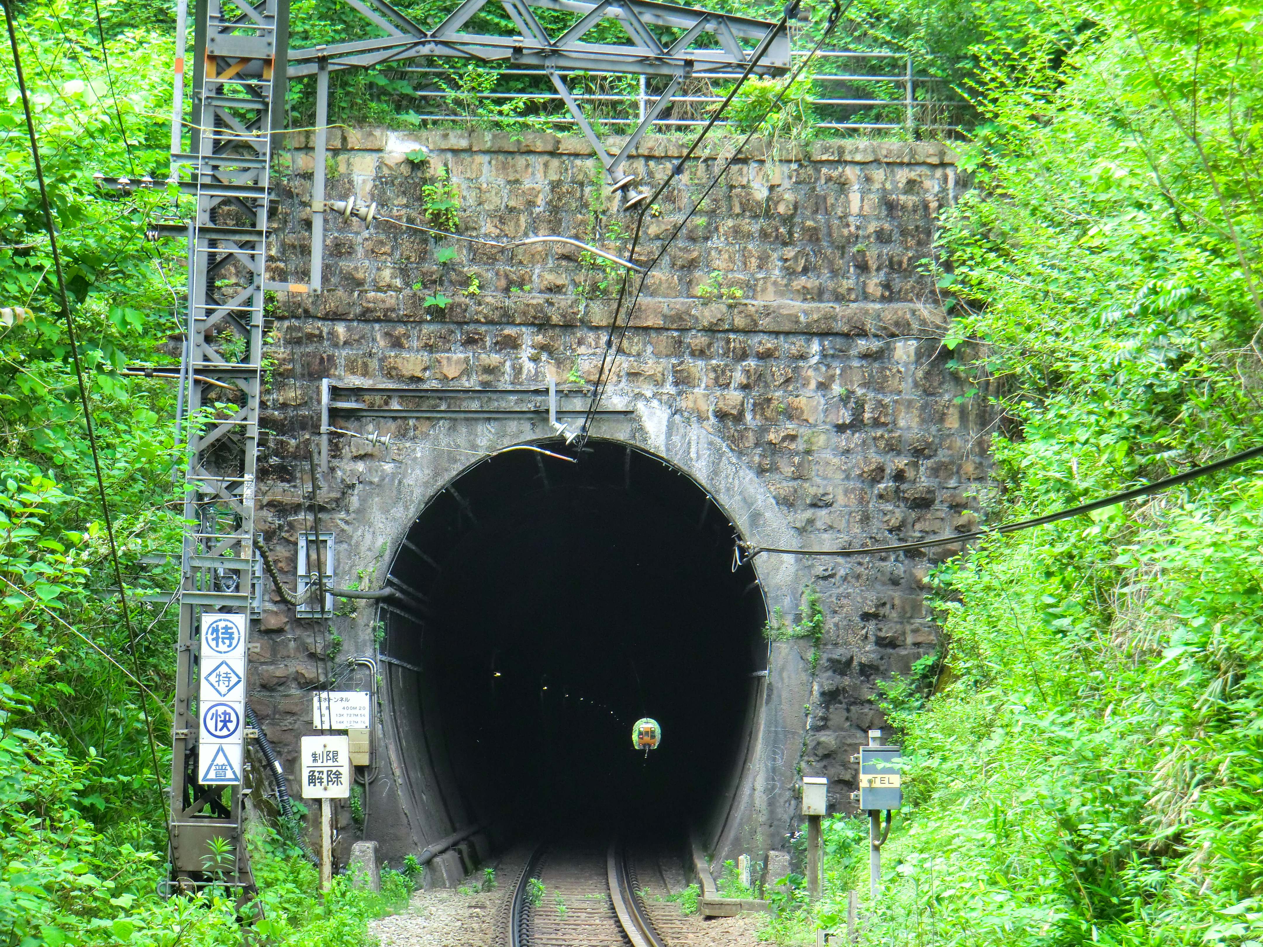 近鉄吉野線、薬水トンネル（南口）